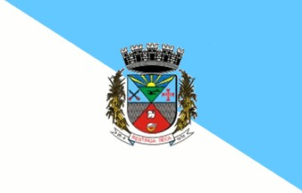 Bandeira da cidade de Restinga Seca.